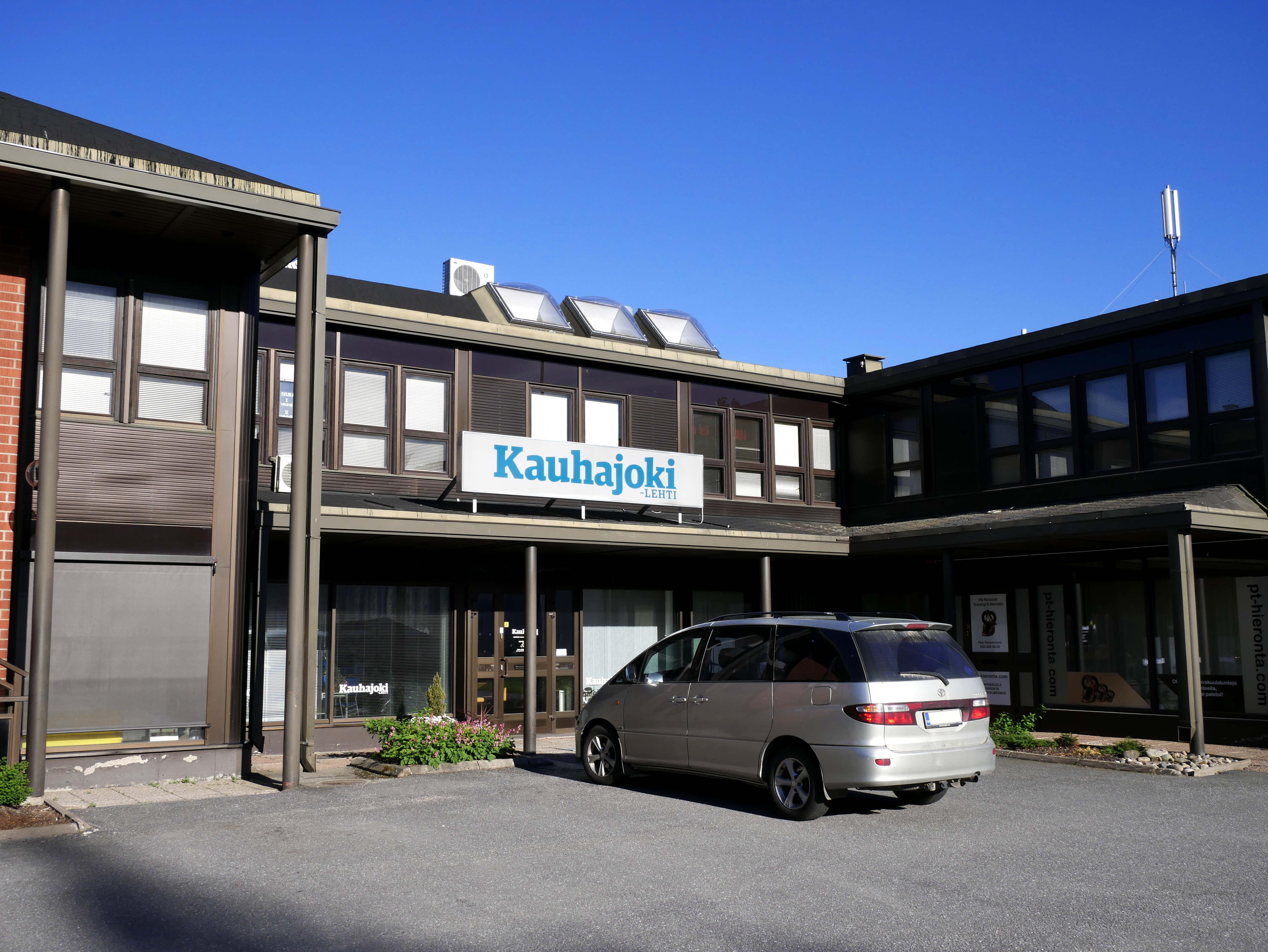 Kauhajoki-lehden toimitus.